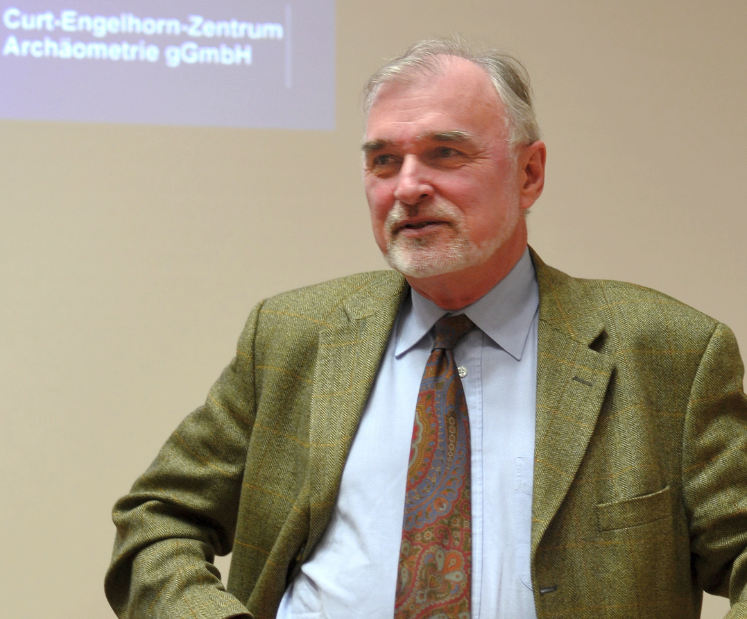 Ernst Pernicka bei einem Vortrag im Niedersächsischen Landesmuseum in Hannover